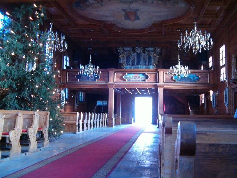 Widok na prospekt organowy w kościele parafialnym pw. Św. Tekli w Dobrzycy, powiat pleszewski, woj. wielkopolskie.